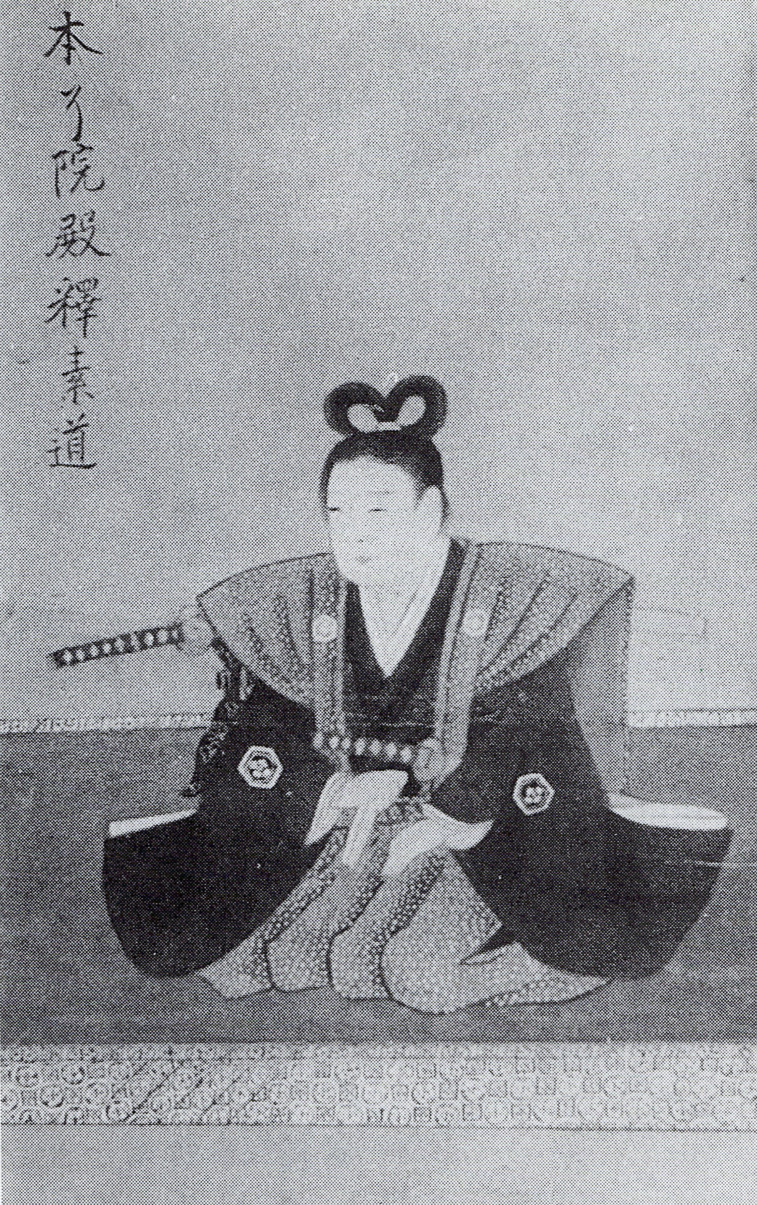 遠藤常久の肖像(モノクロ)。